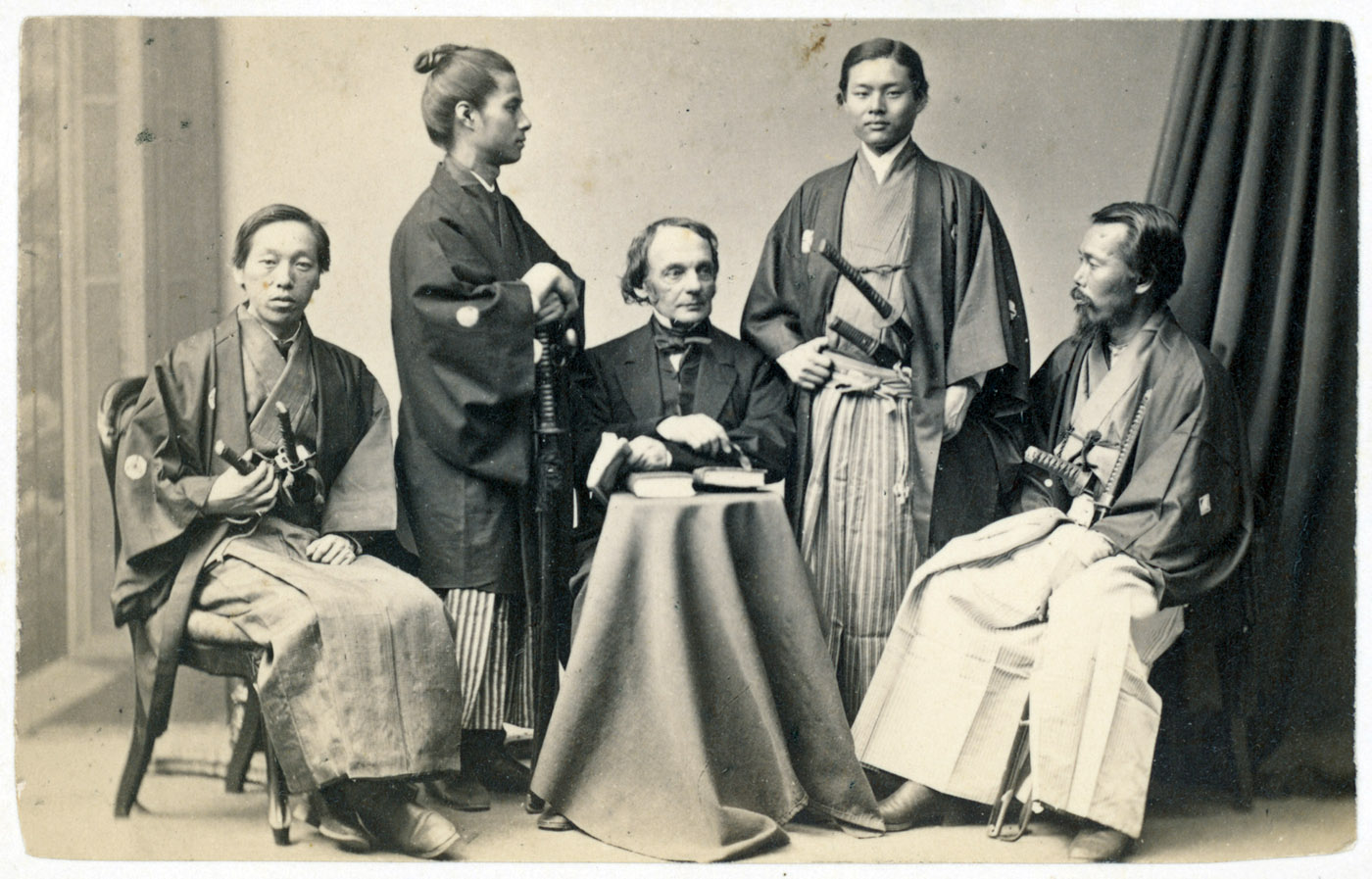 Portrait of Charles K. Dillaway "and Japanese students" (Hanabusa Kotaro, Hiraga Isasaburo, Tsuge Zengo, and Aoki Yoshihira)